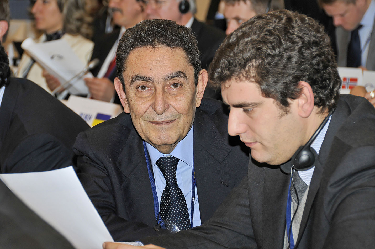 09_Bonn_0021